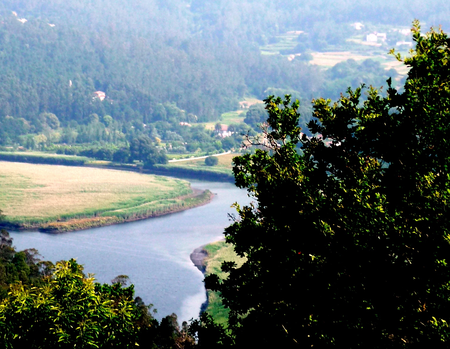 Meandros do río Tambre en Noia